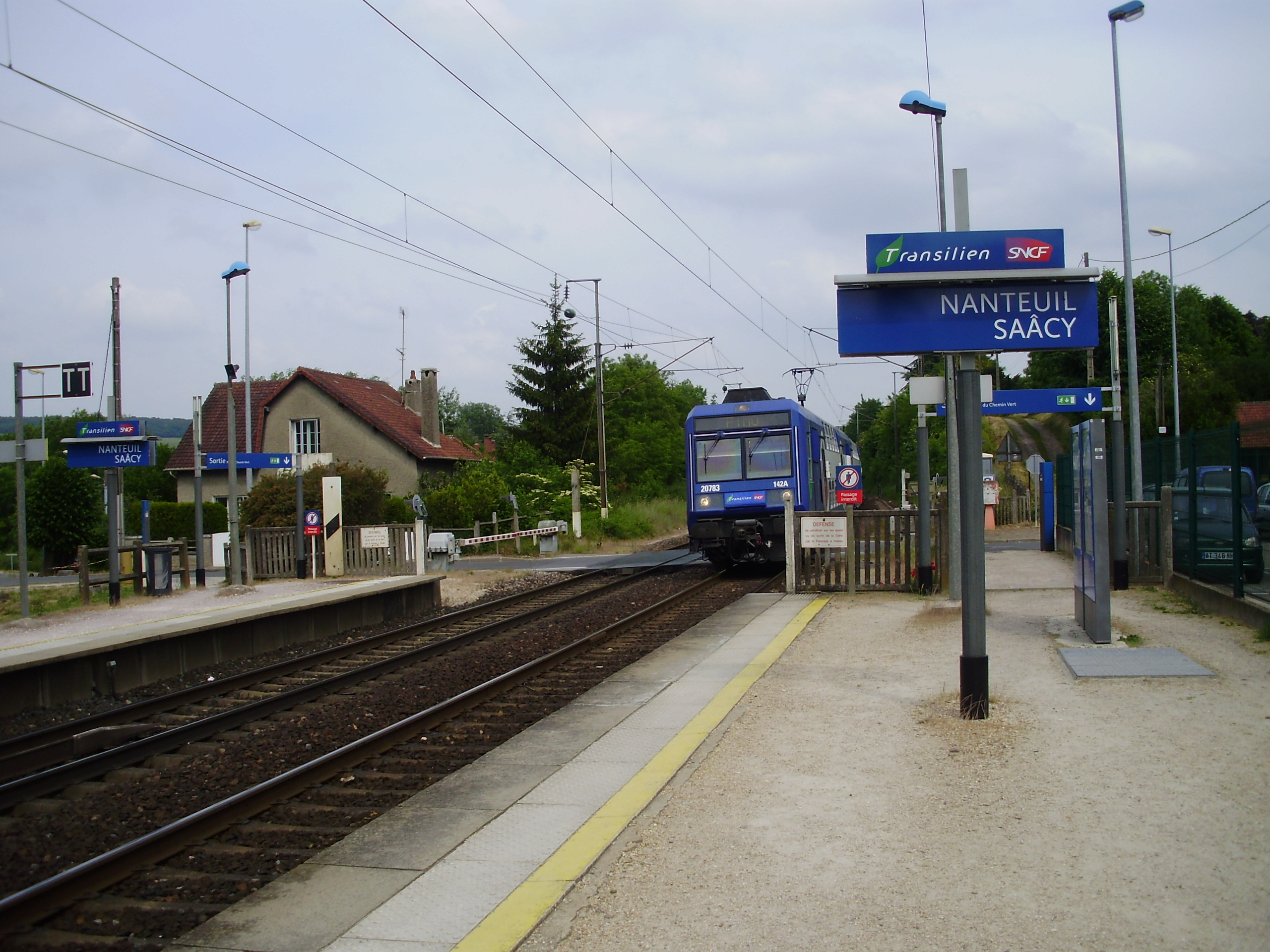 Gare de Nanteuil - Saâcy, à Saâcy-sur-Marne, Seine-et-Marne, France : arrivée d'une rame de type Z 20500 (ici la rame Z 20783/84) à destination de Paris-Est